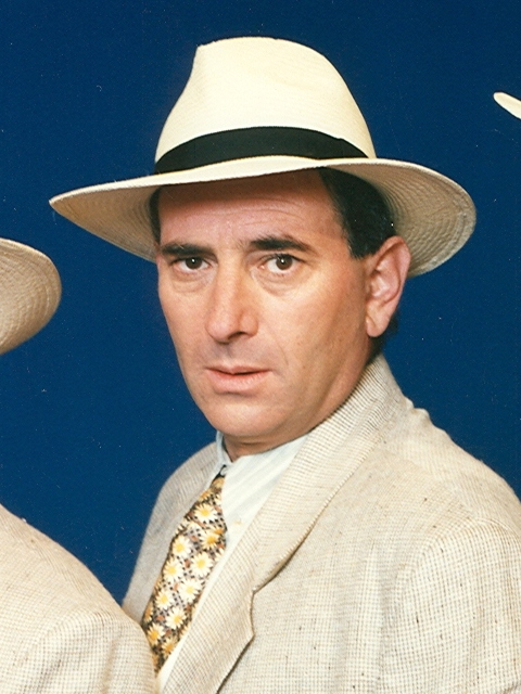 המופע של זהו-זה" ששודרה בערוץ 2 אבי קושניר דב'לה גליקמן ומוני מושונוב